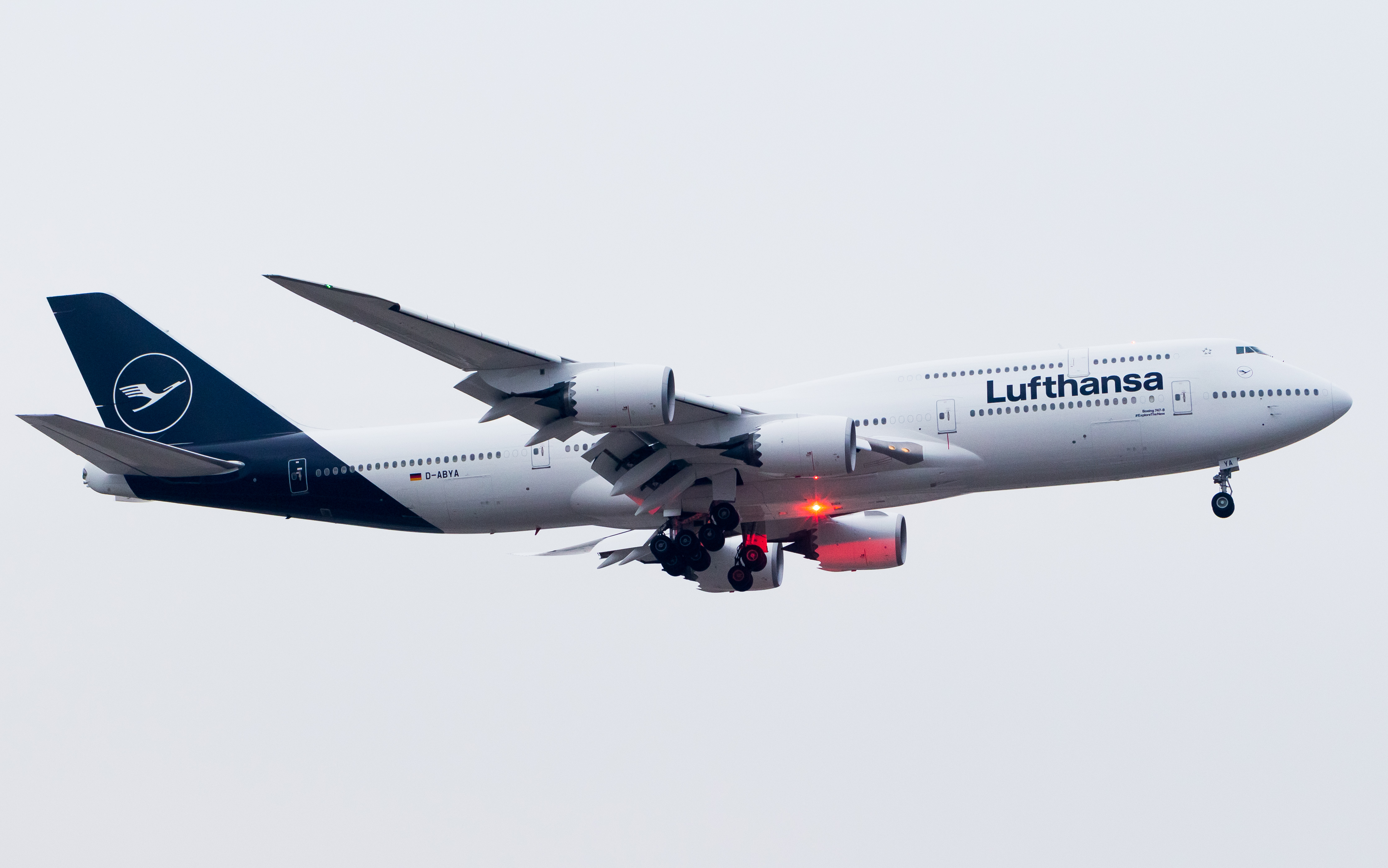 Lowpass in STR / EDDS / Stuttgart Airport im Rahmen einer "Deutschlandtour" der neuen Lackierung